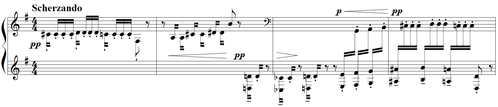 Debussy - Etude "pour les notes répétées", mes.1-4